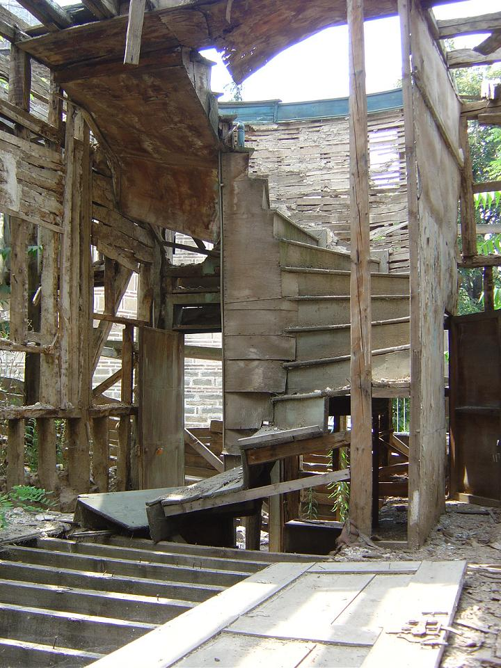 Lisans